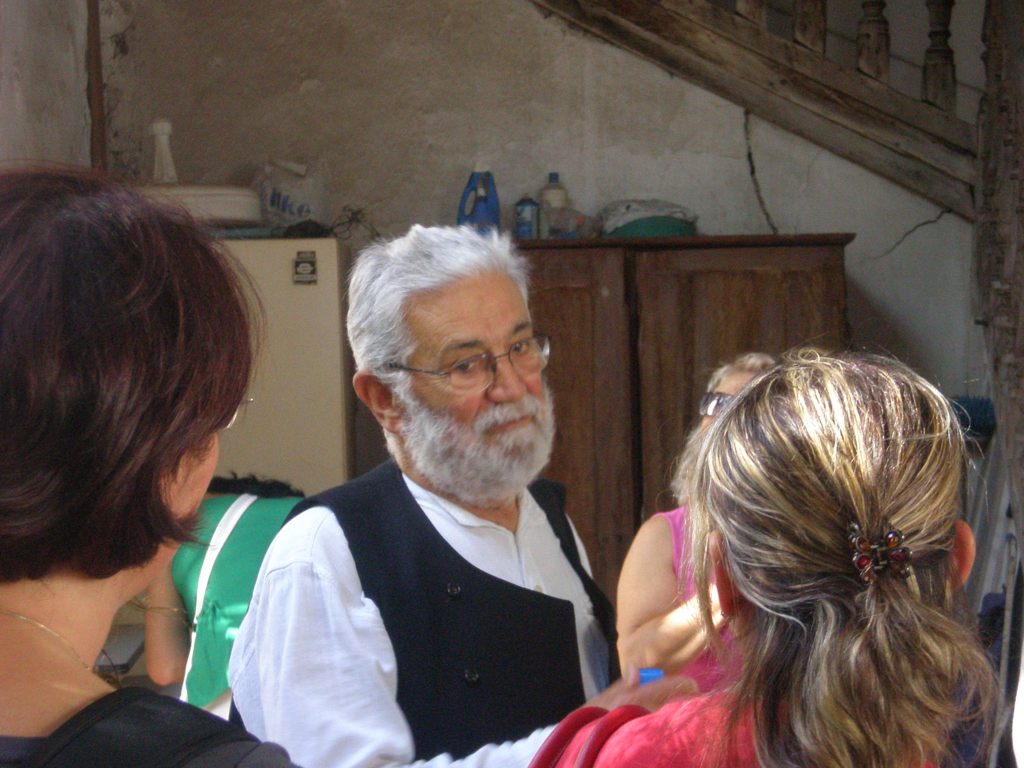 Cengiz Bektaş